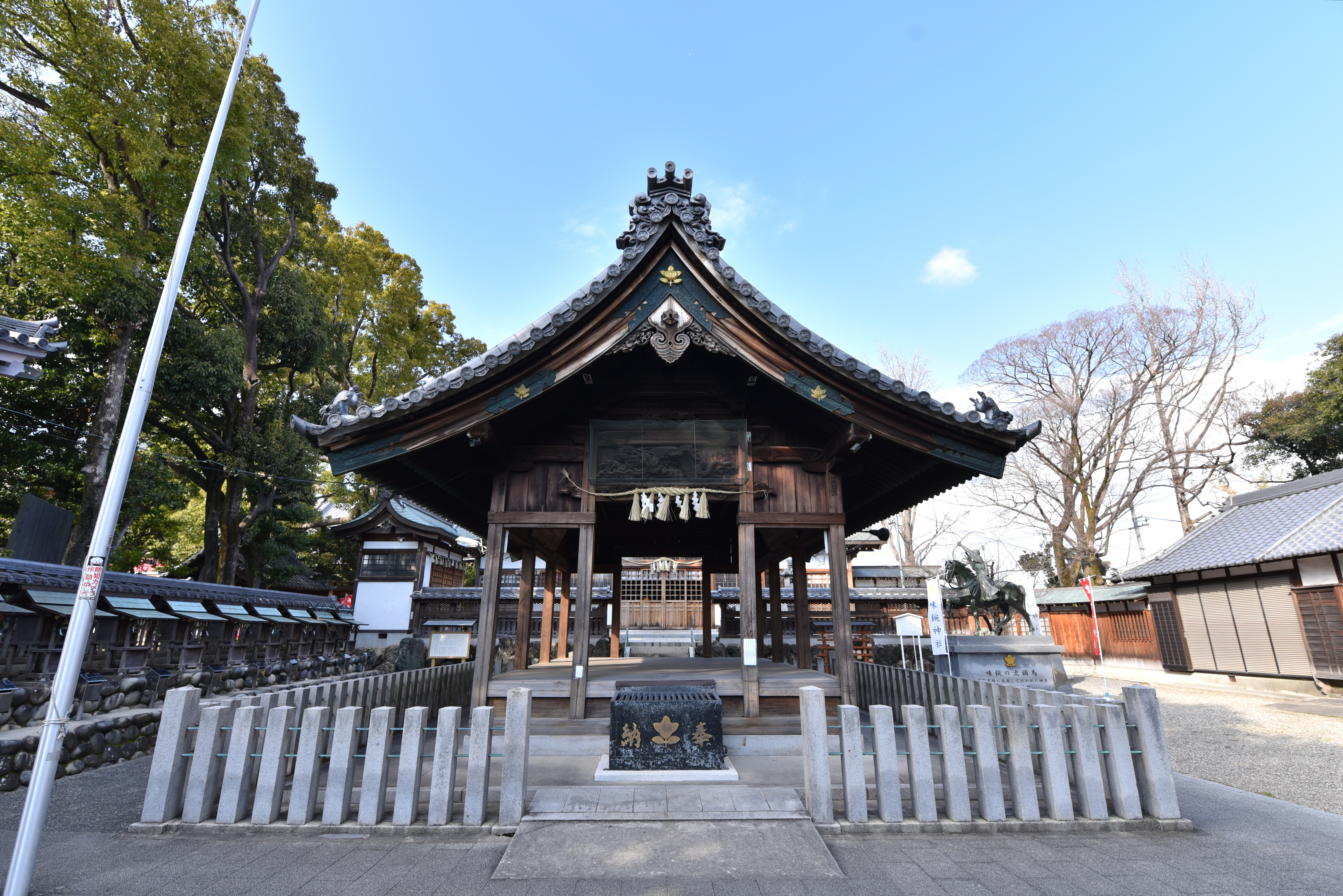 味鋺神社拝殿 Nikon D750